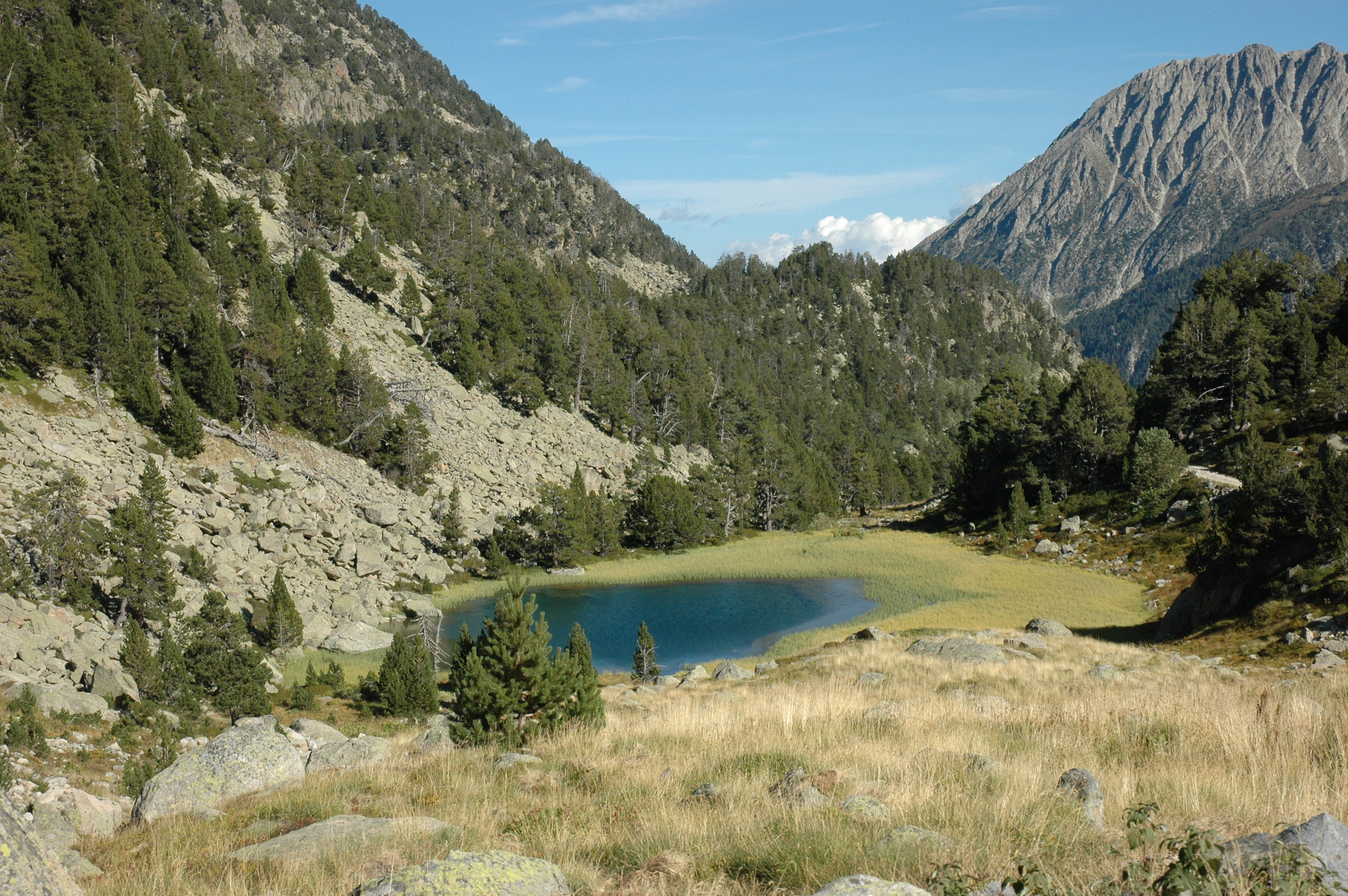 Estany de la Bassa, al circ de Ratera d'Espot (Pallars Sobirà)